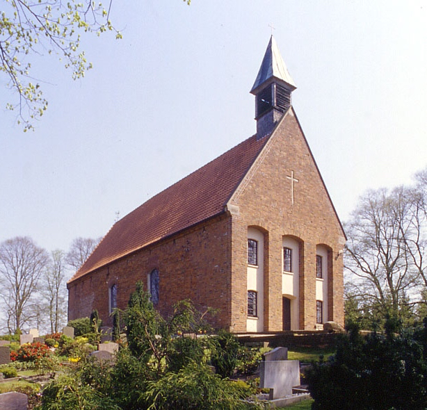 St. Dionysius Kirche im Holler Kirchweg, Stadtteil Holle, Hude (Oldenburg) 53.159143°N 8.370873°E